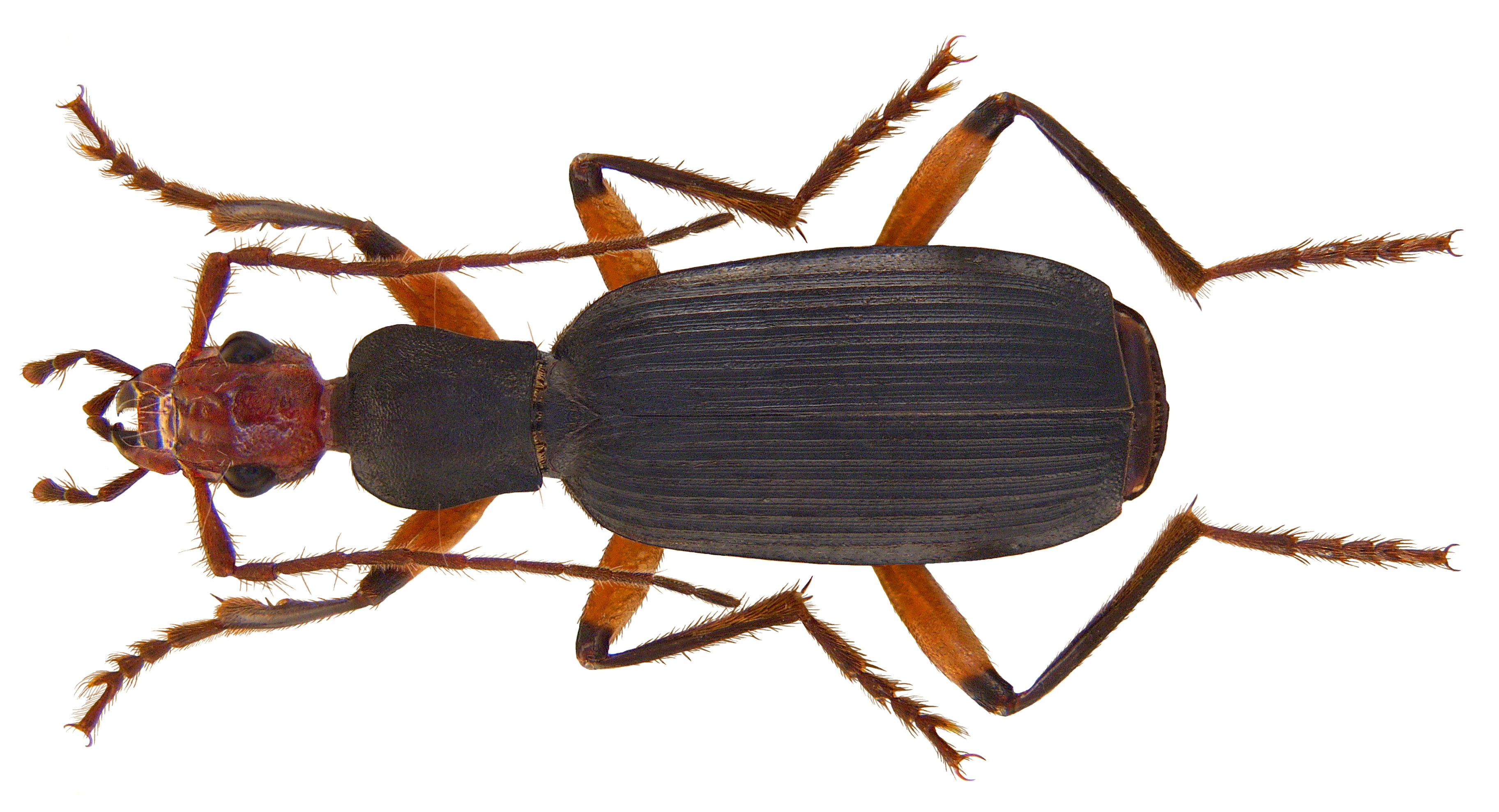 Familie: Carabidae Groesse: 20-22 mm Fundort: Nepal, Narayani-Prov., Sauraha, Rapti-River, 180 m leg. A.Skale, 2000; det. W.Lorenz, 2002 Photo: U.Schmidt, 2009